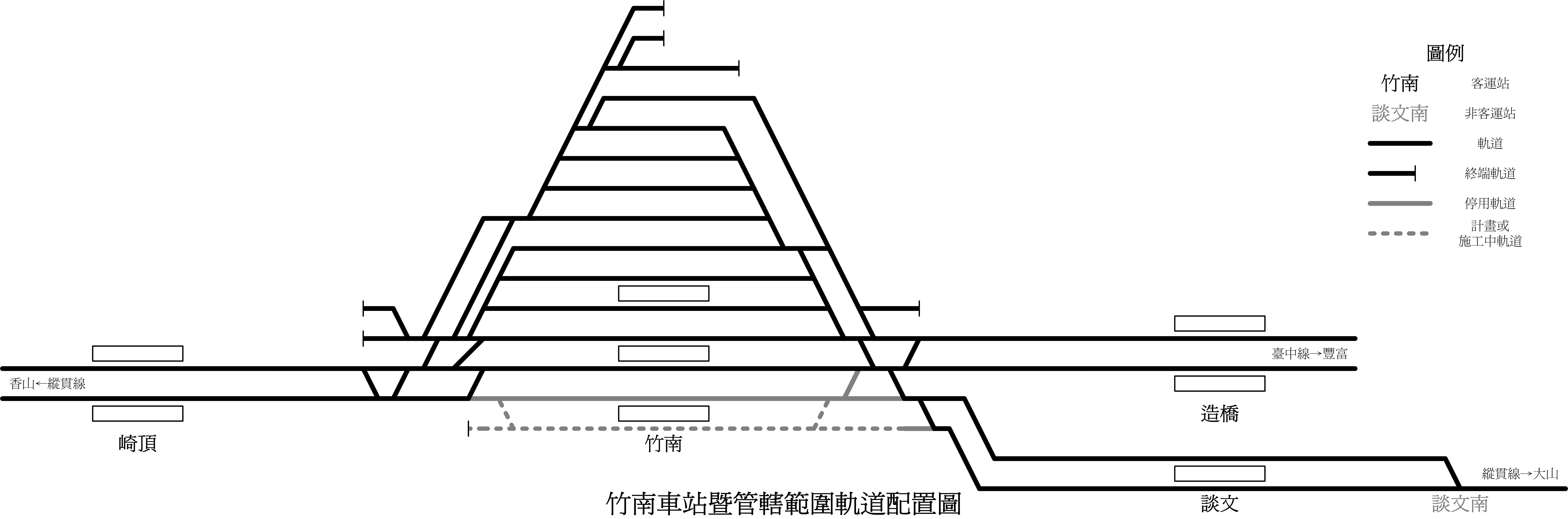 竹南車站軌道配置圖，使用 Microsoft Visio 繪製。